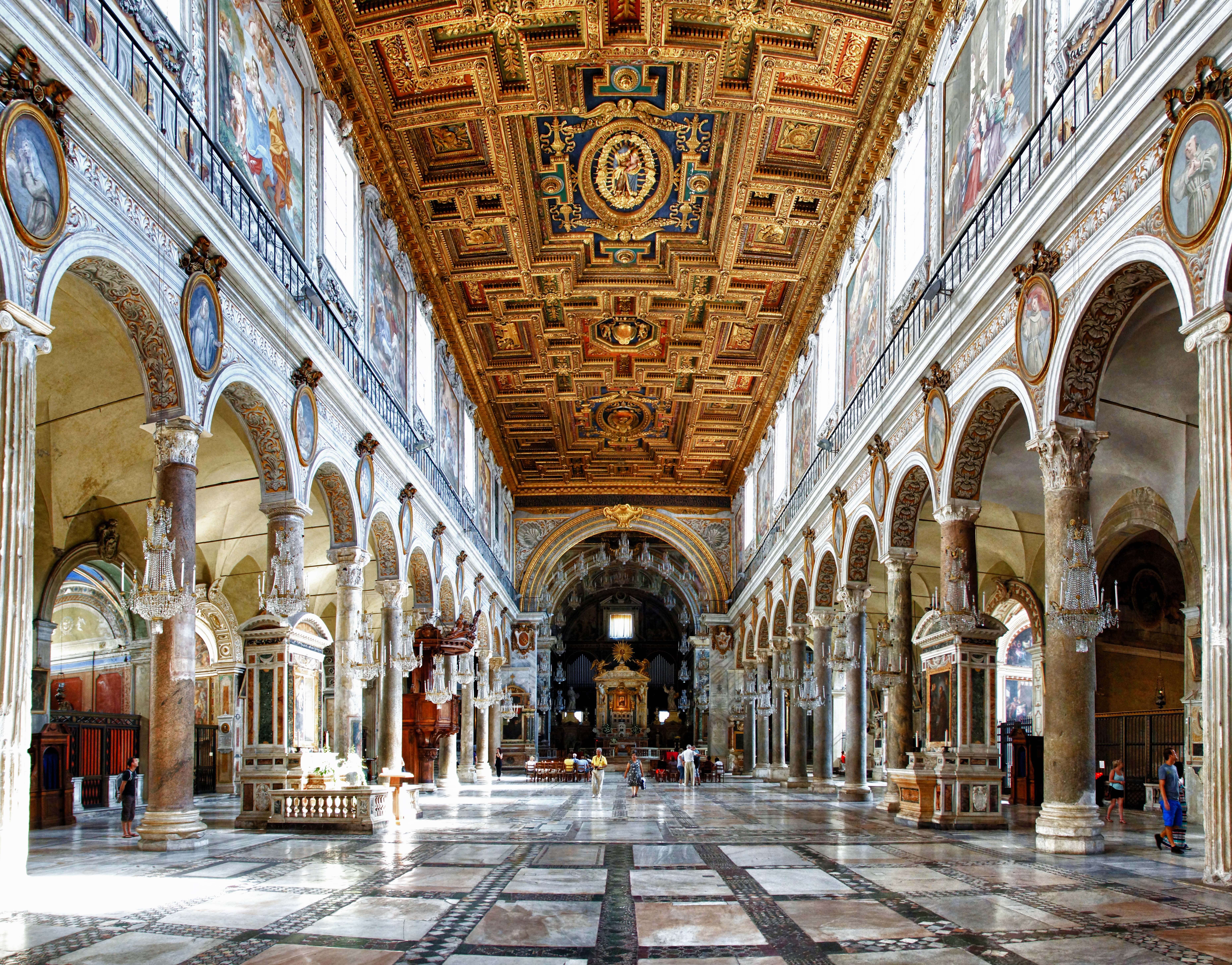 Roma / Rome - Lazio - Italia / Italy